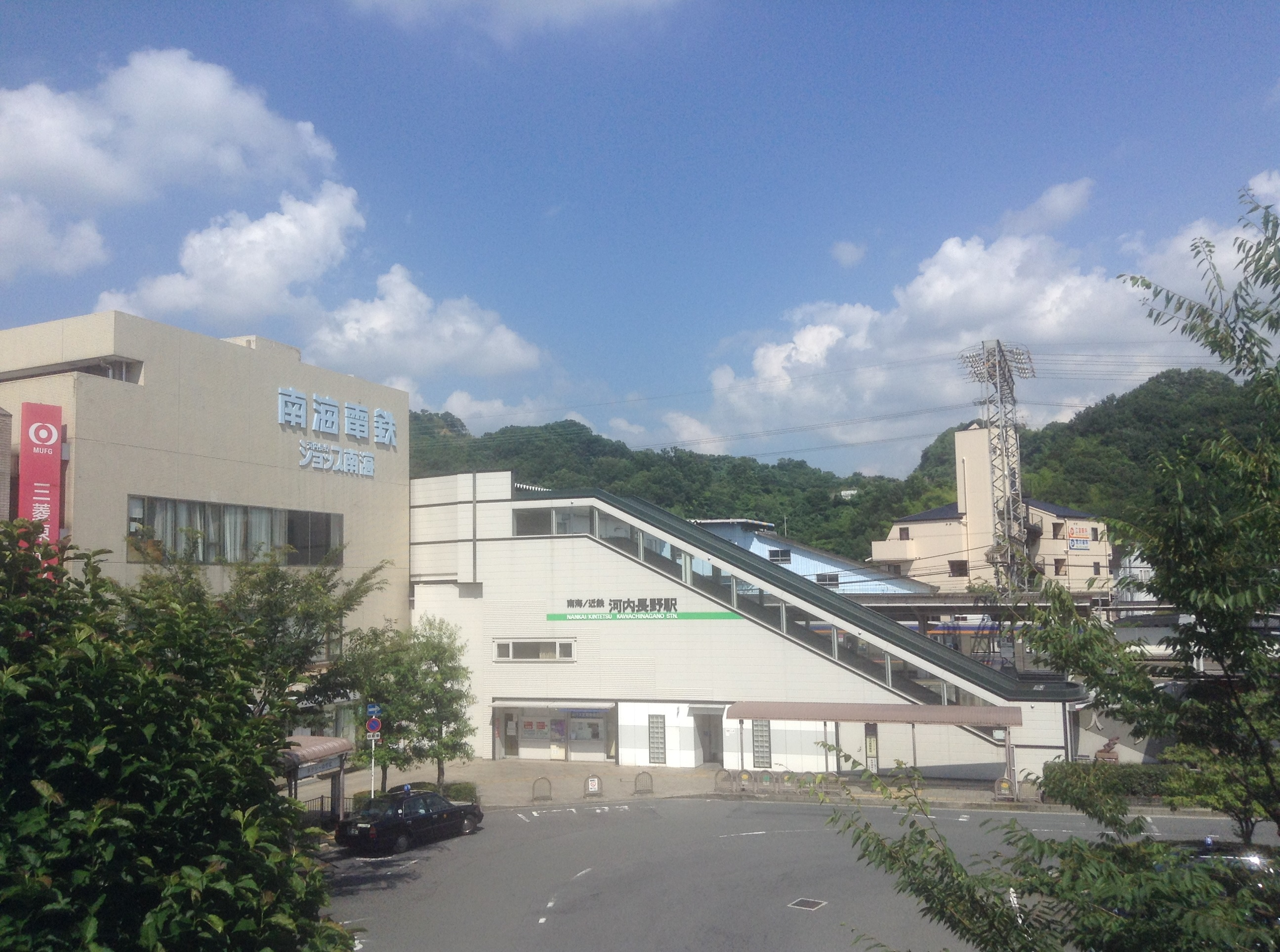 河内長野駅